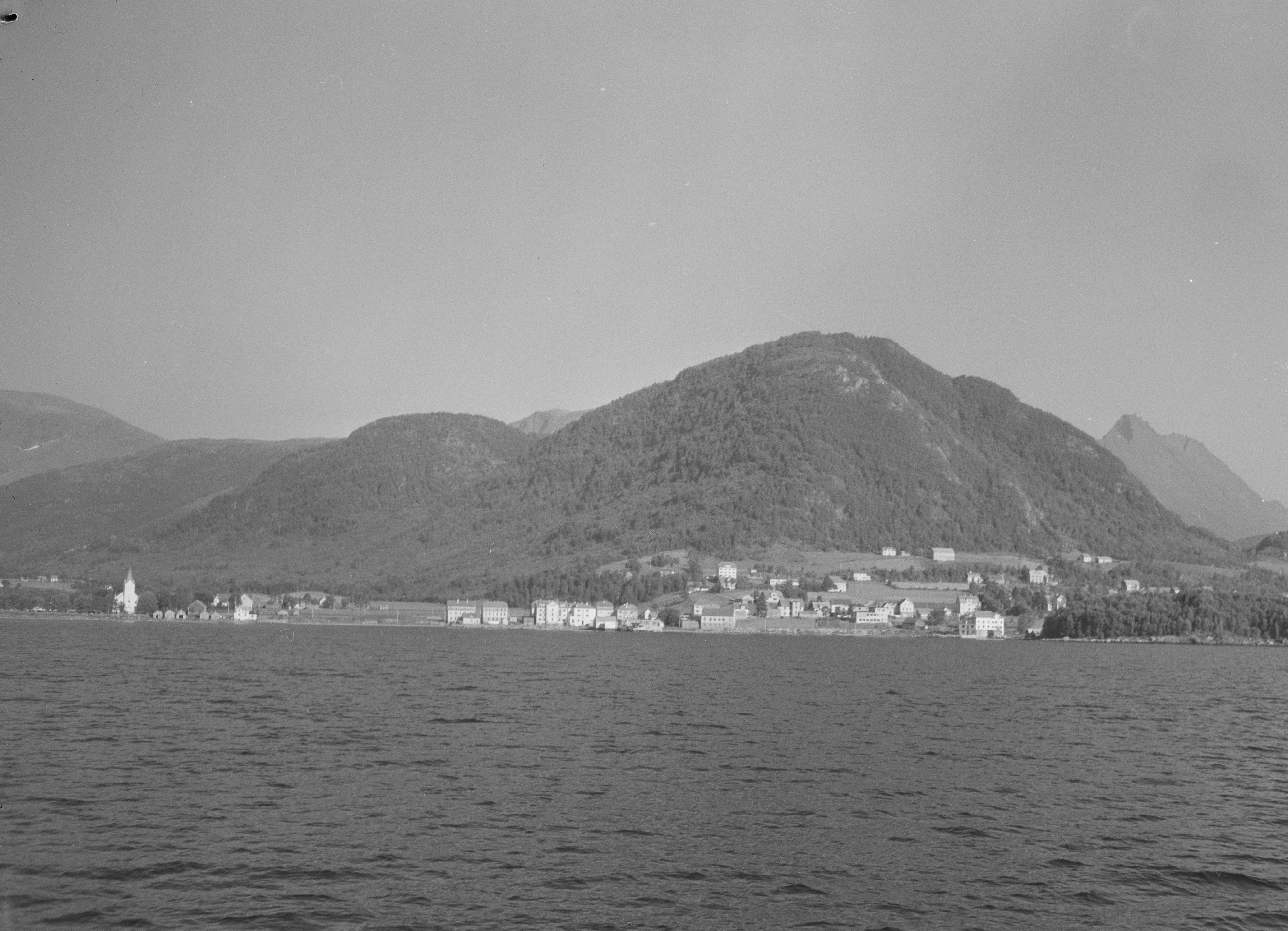 Bildet er hentet fra Nasjonalbibliotekets bildesamling. Anmerkninger til bildet var: Fotograf : ukjent Aure,Sykkylven, Sykkylven, Møre og Romsdal